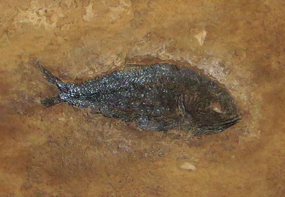 Fossil of Pholidorhynchodon, an extinct fish- Took the picture at Museo di Scienze Naturali, Bergamo